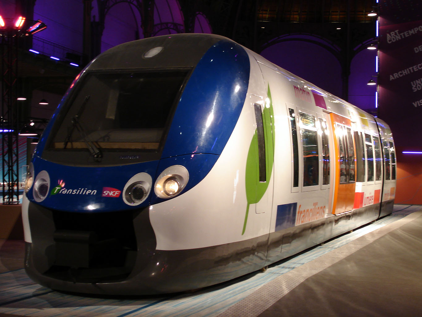 Maquette de la rame NAT (nouvelle automotrice transilien) Nef du Grand Palais à Paris, France Décembre 2007 Photo personnelle (own work) de Clicsouris